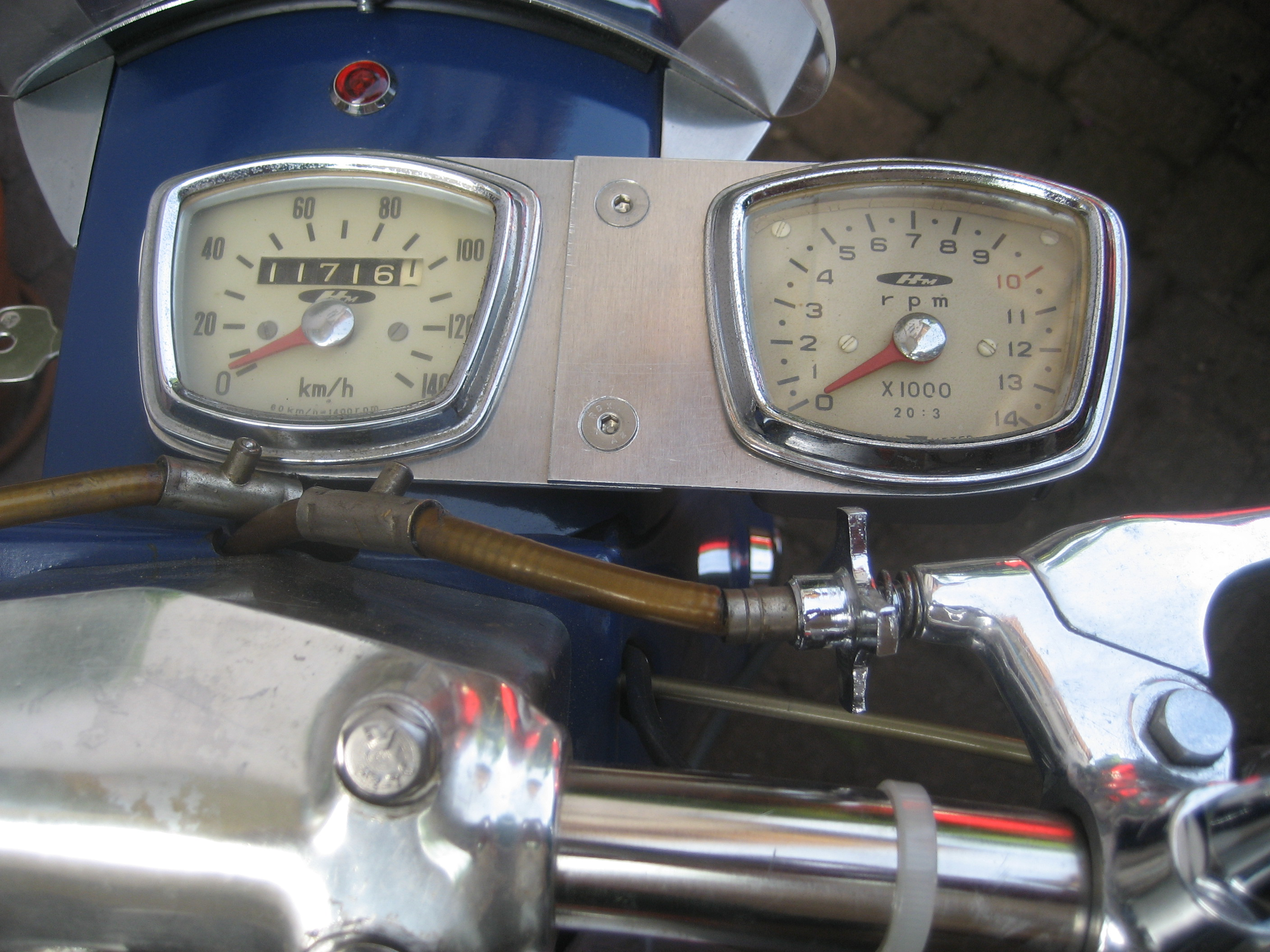 Honda CB92 speedometer+rev counter